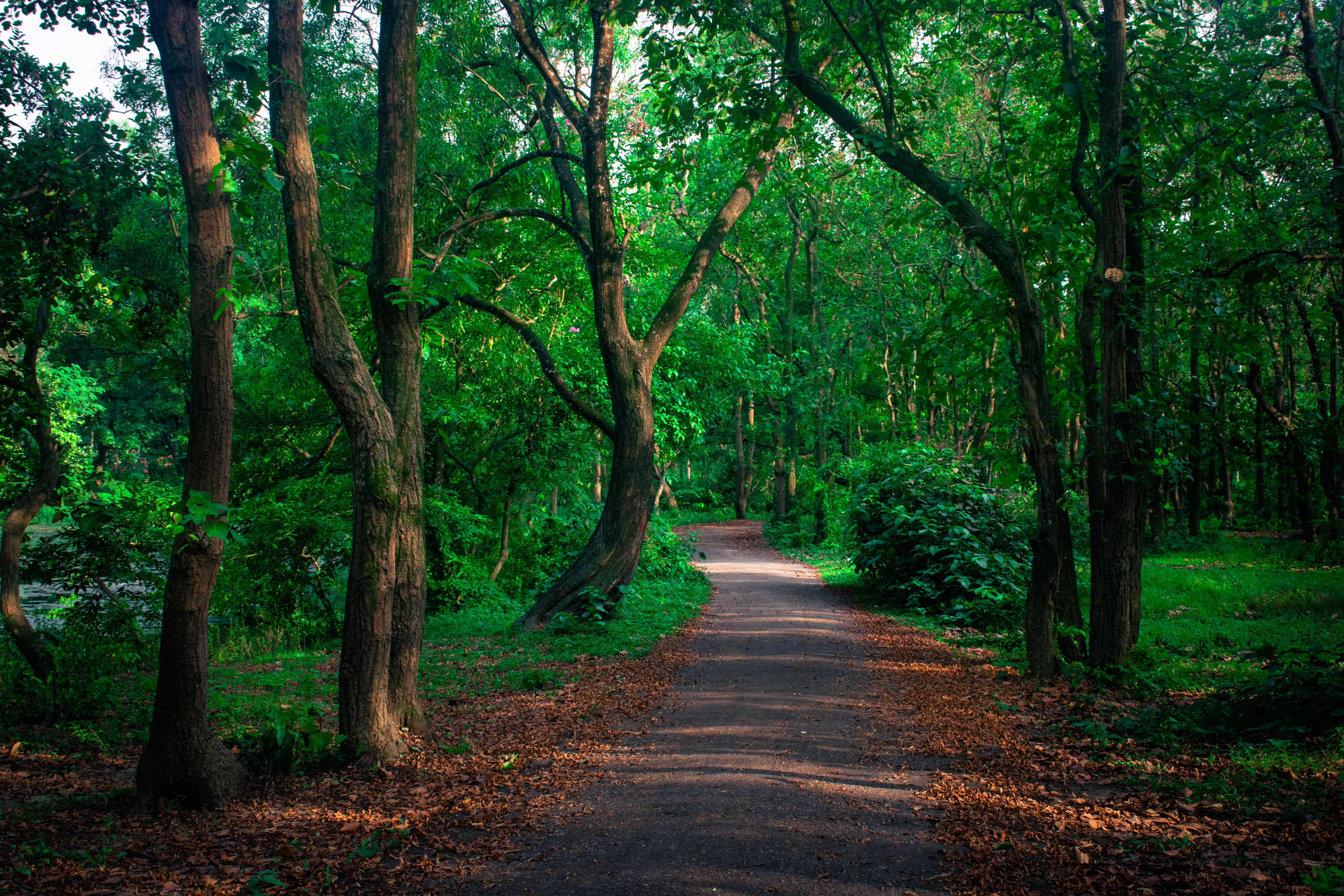 ভাওয়াল জাতীয় উদ্যান